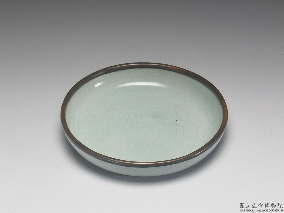 中文（中国大陆）: 北宋汝窑青瓷洗(“奉华”铭)